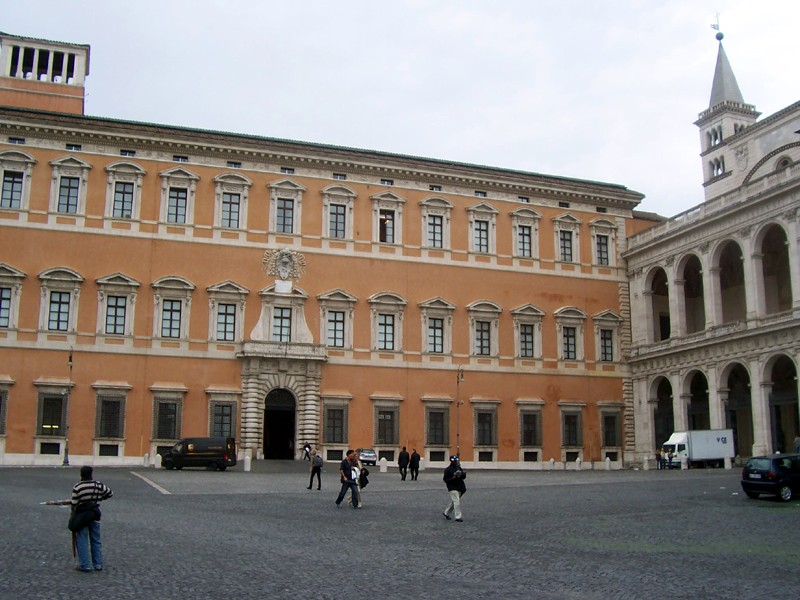 Roma - Palazzo Lateranense